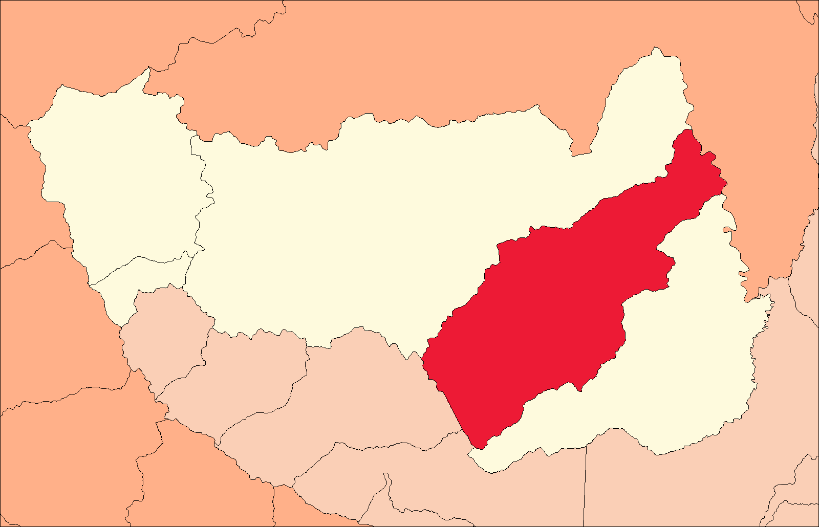 Área del distrito de Santa Rosa de Alto Yanajanca en la provincia de Marañón.